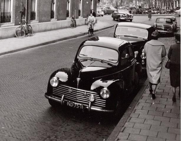 ND-75-11 Peugeot 203